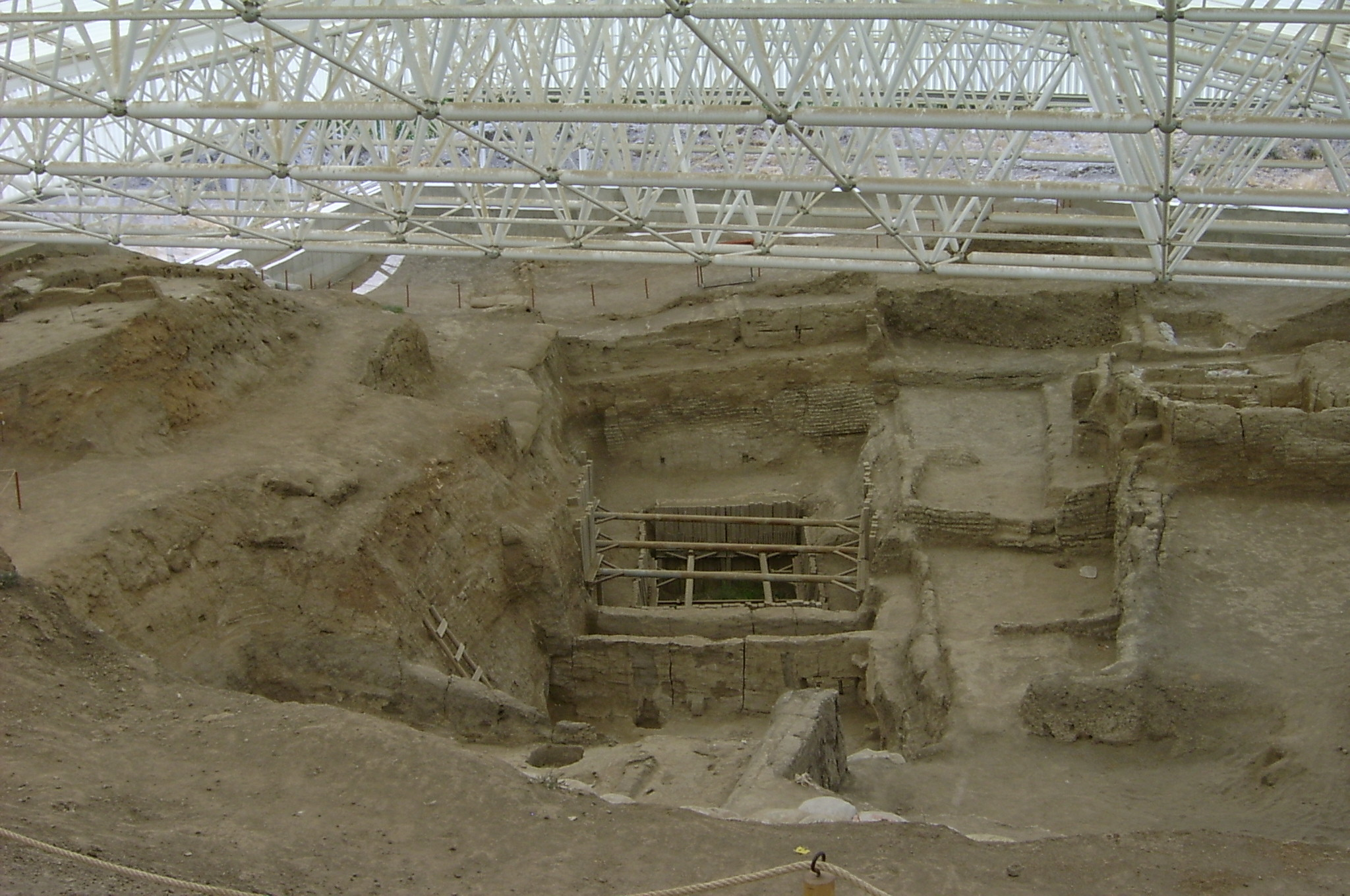 Çatal Hüyük excavations